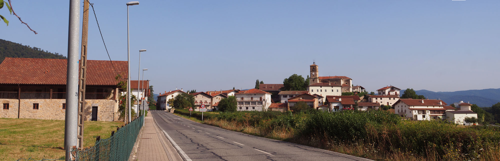 Lizaso herrepidetik ikusia